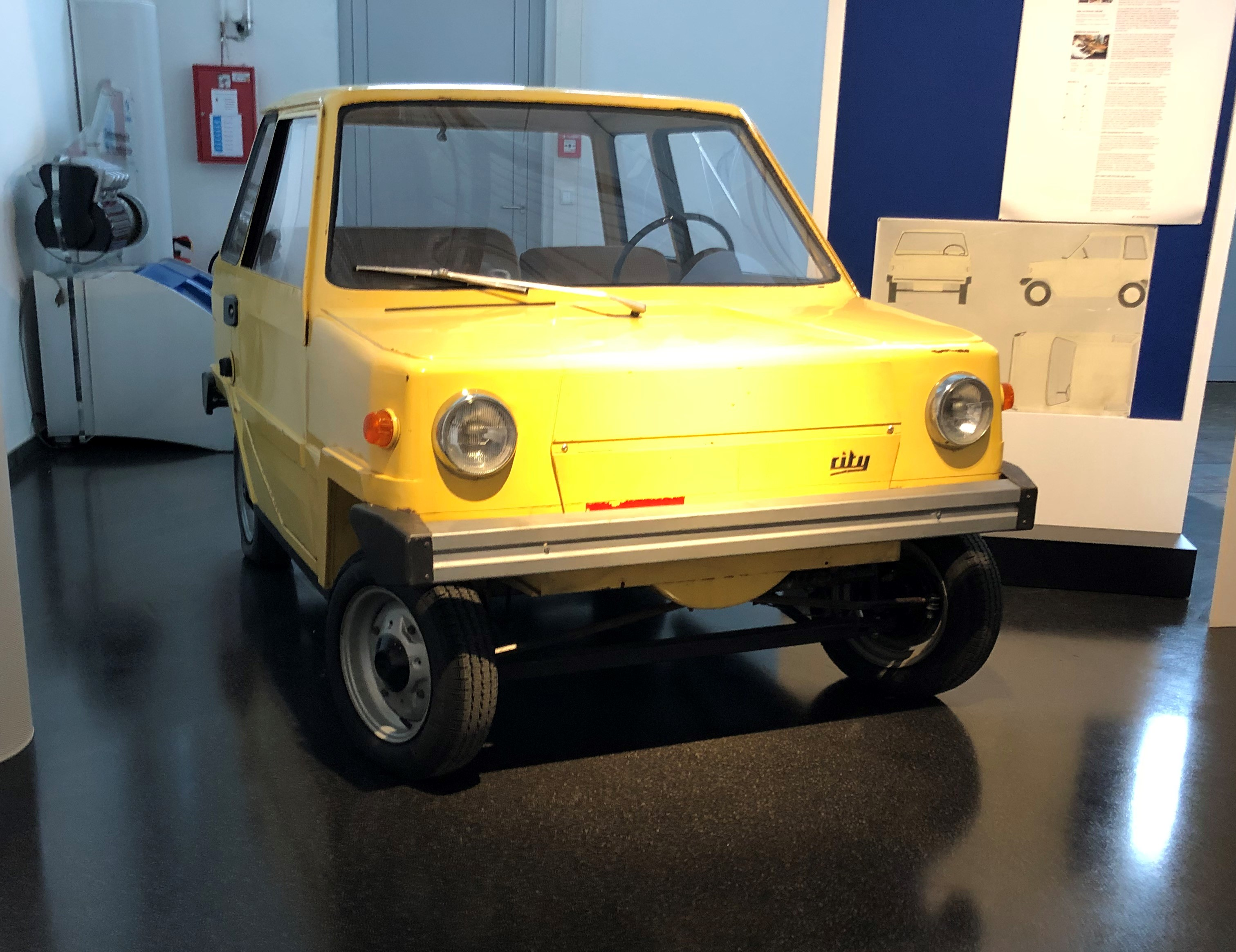 In dem Foto ist der Sachs 1 City abgebildet. Dieser wurde kürzlich in der Sachs-Ausstellung in Schweinfurt von mir bei einer Führung fotografiert.